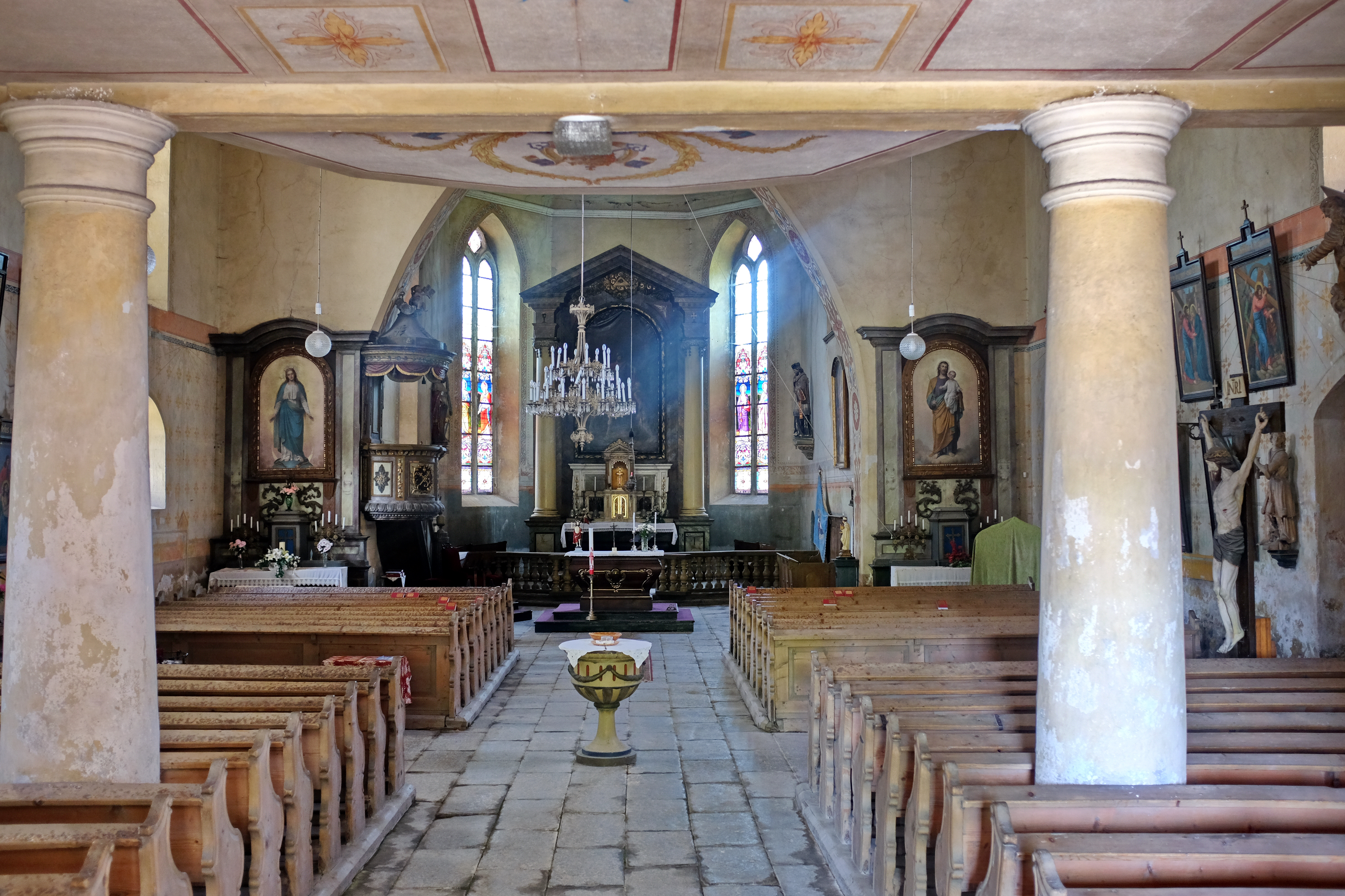 Kostel svatého Martina, Jindřichovice (okres Sokolov).